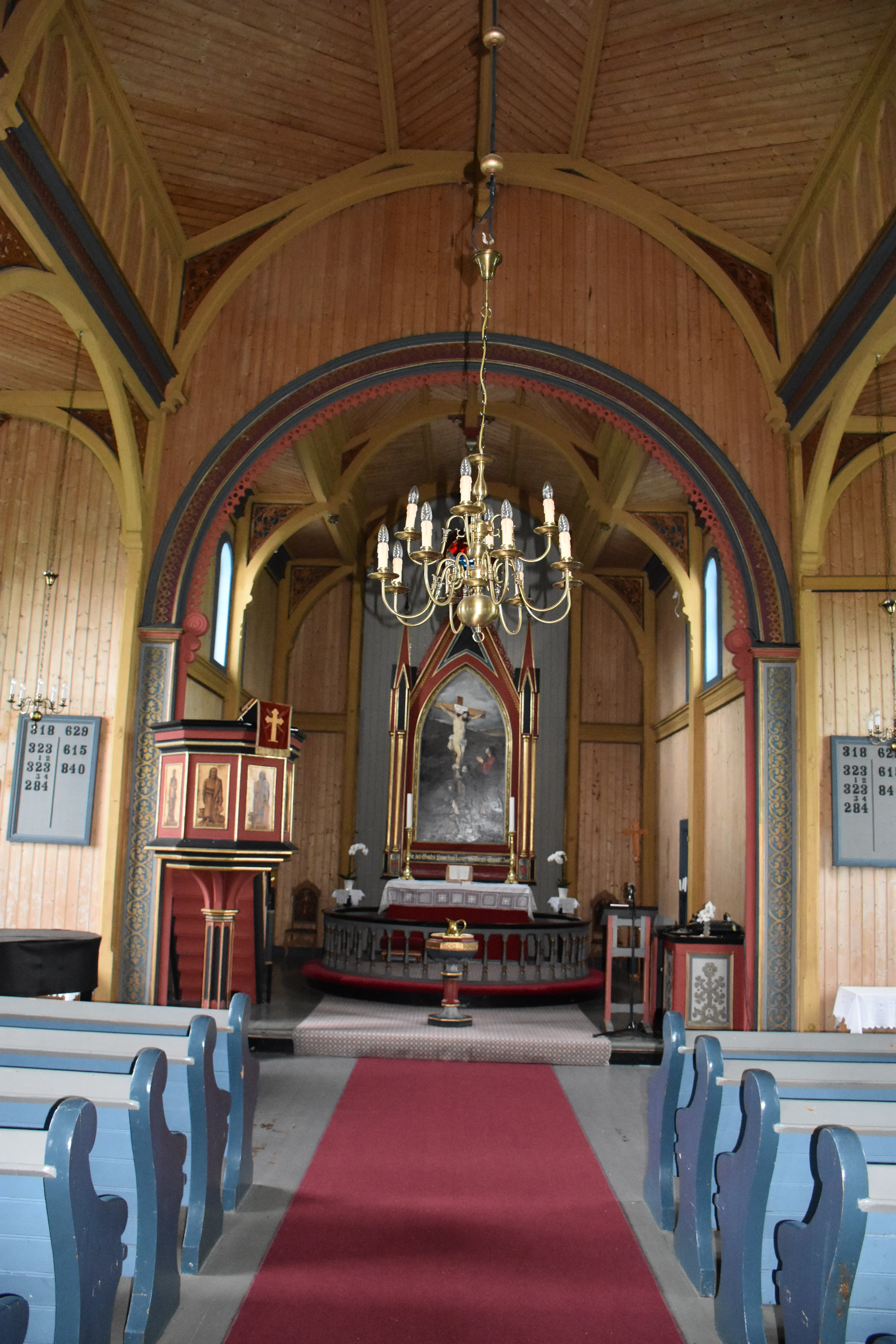 Mot koret i Kvernes kirke